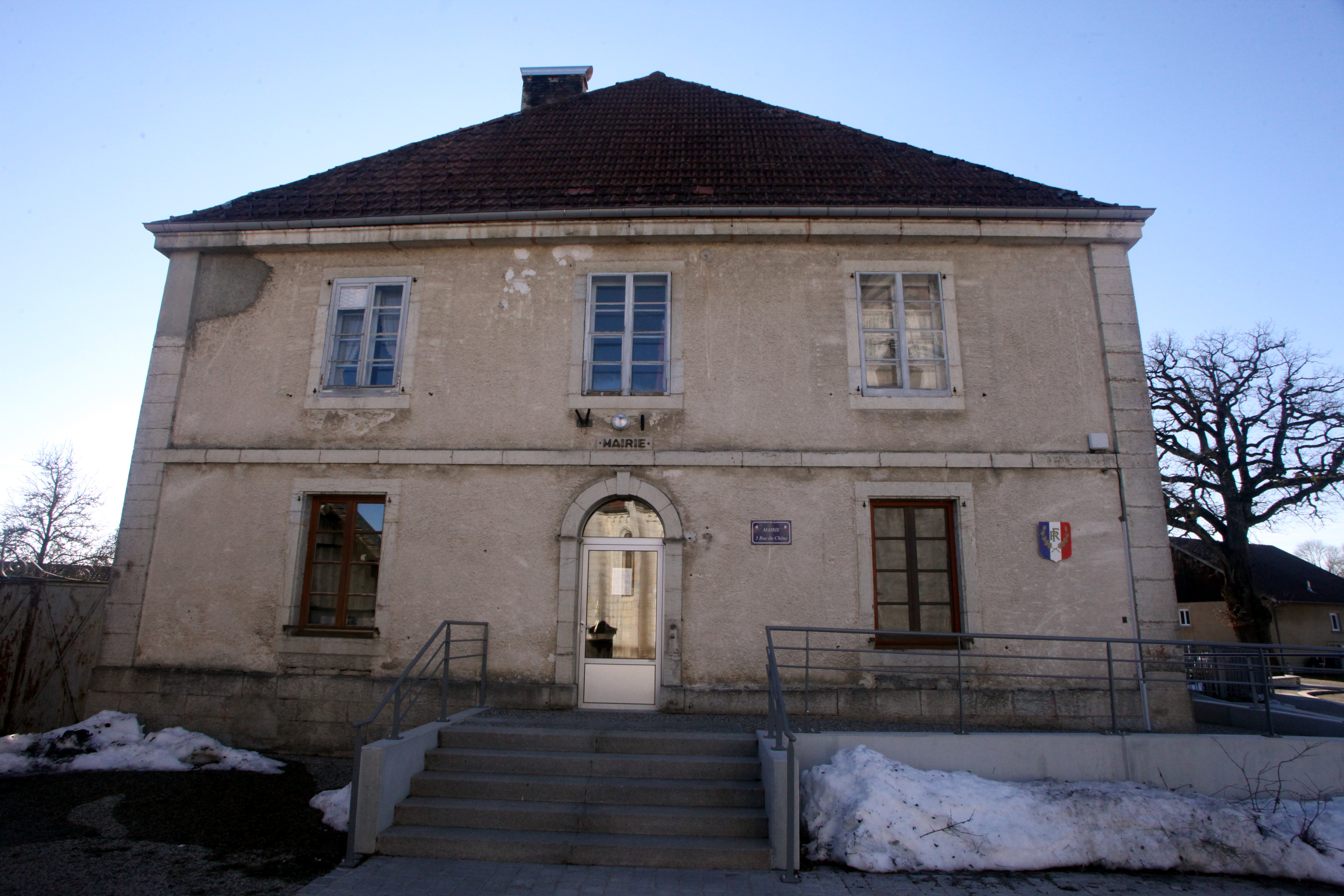 Mairie de Mont-de-Laval.